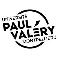 Logo de l'université Paul Valéry - Montpellier 3 Nouvelle version de l'identité visuelle de l'établissement, février 2017